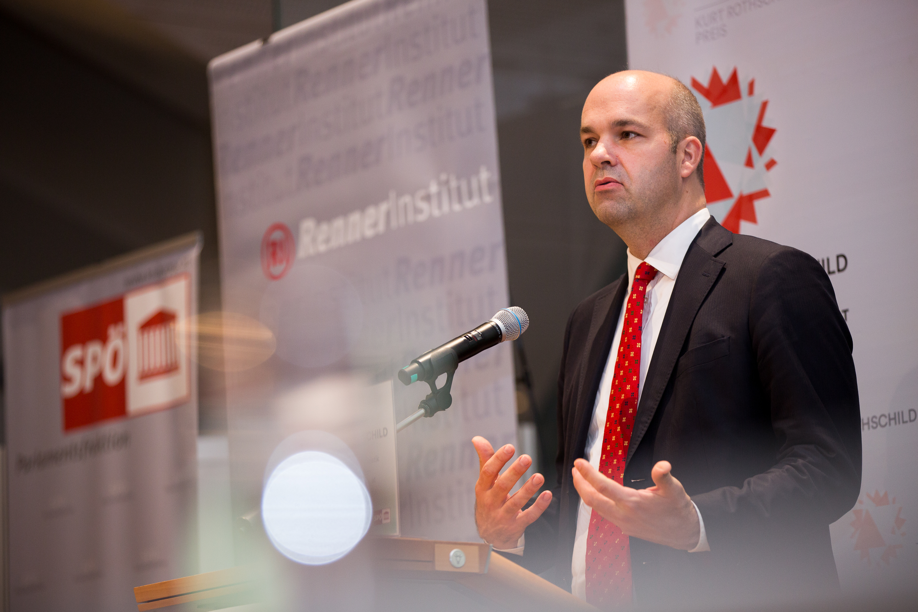 ©Lea Pachta